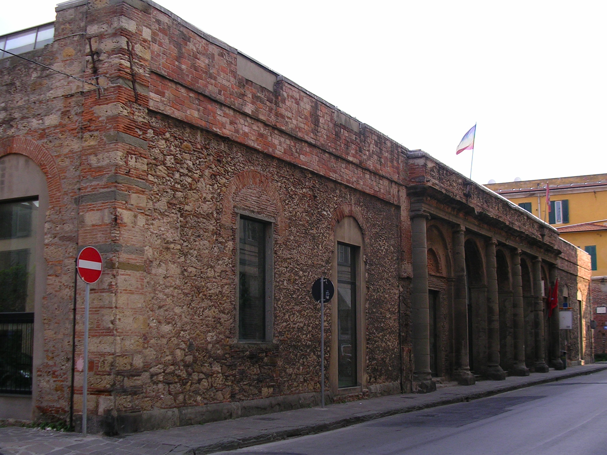 Livorno: i resti del Teatro San Marco (1806) distrutto dai bombardamenti della seconda guerra mondiale e dalle demolizioni postbelliche. Era uno dei più bei teatri italiani, completamente decorato da Luigi Ademollo. Qui si tenne il congresso che portò alla fondazione del Partito oomunista d'Italia. Nel dopoguerra si preferì abbatterlo piuttosto che restaurarlo e solo in anni recenti i resti dei muri perimetrali e della facciata sono stati integrati in una moderna struttura scolastica.